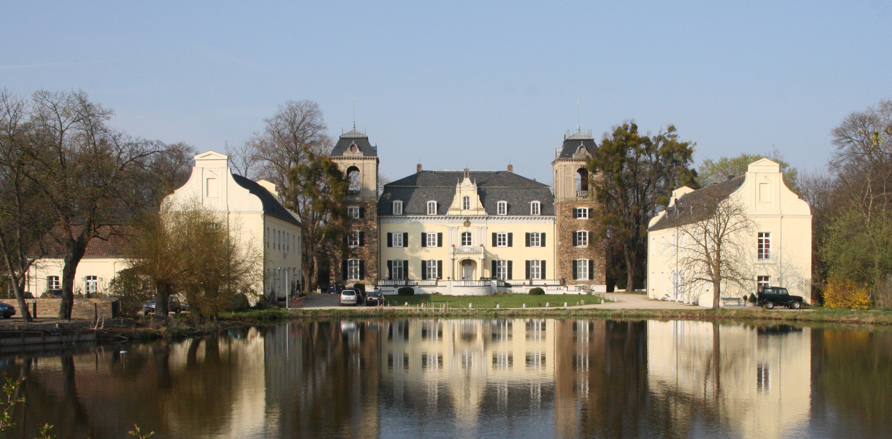 Burg Flamersheim, Euskirchen